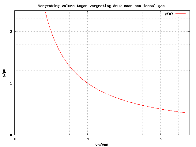 zelfgemaakt met gnuplot, het plaatje plaats ik hierbij in het publiek domijn (grote woorden ;-) ) Gebruikt op ideaal gas